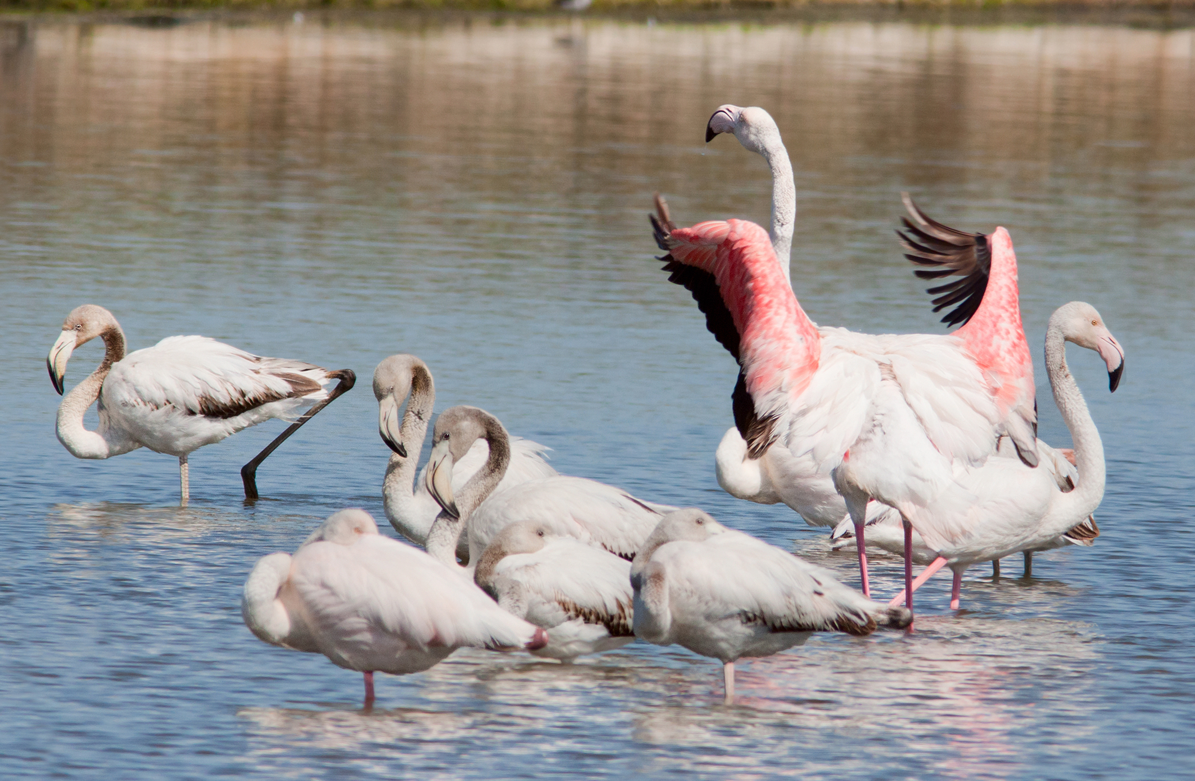 Phoenicopterus roseus, Siracusa, Sicilia, Italia.